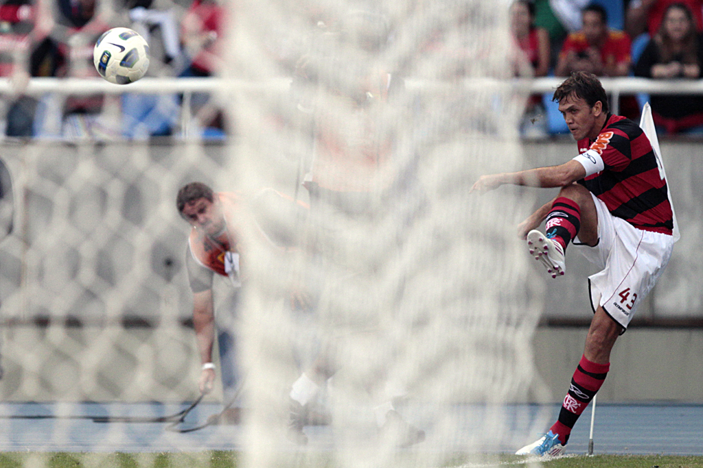 Despedida de Petkovic do futebol profissional. Último escanteio cobrado pelo Flamengo. Flamengo 1 x 1 Corinthians - Brasileiro 2011